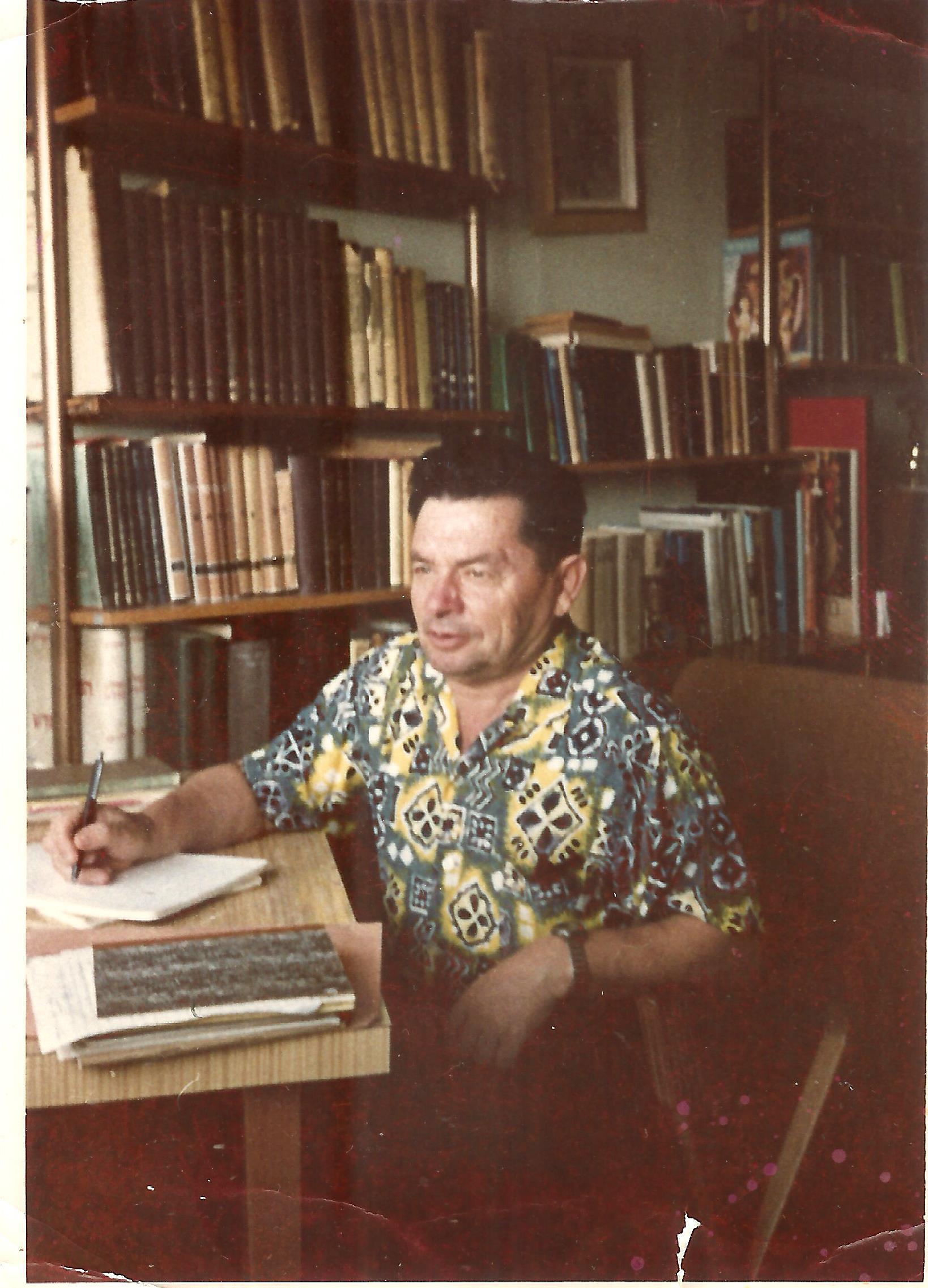 אריה לוי שריד בביתו בגבעת המורה, שנות ה-90